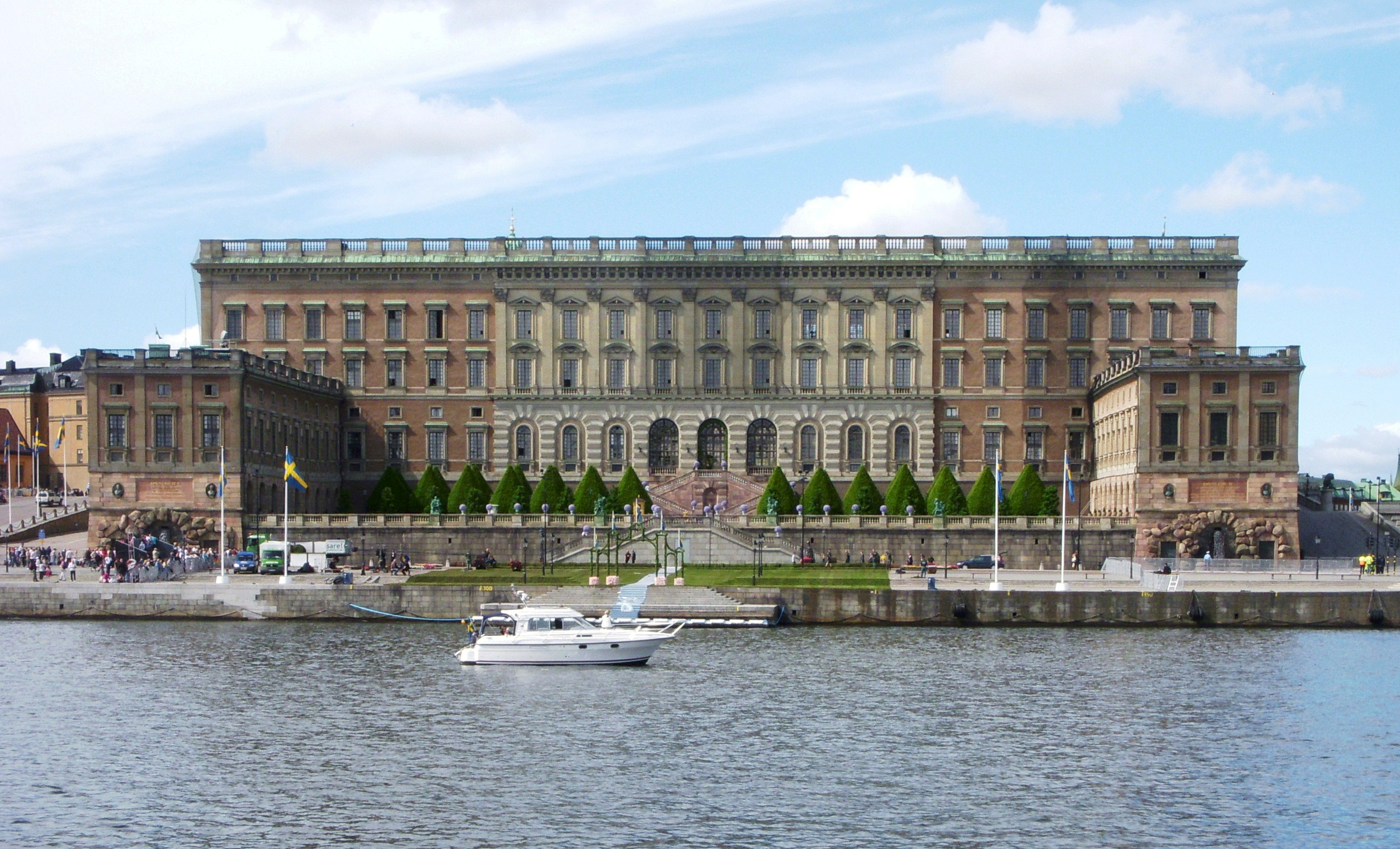 Kungliga slottet, Stockholm